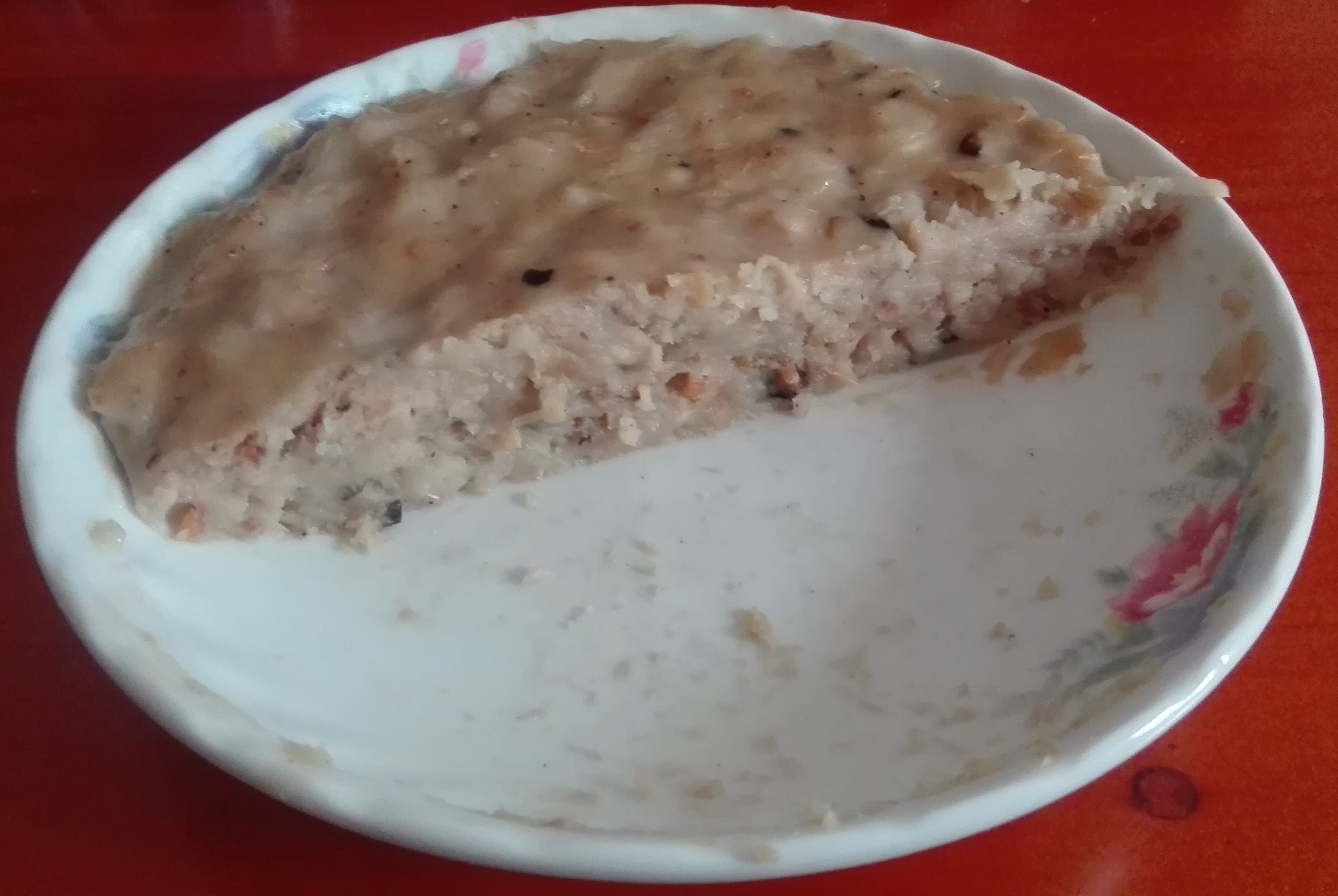 客家特色美食